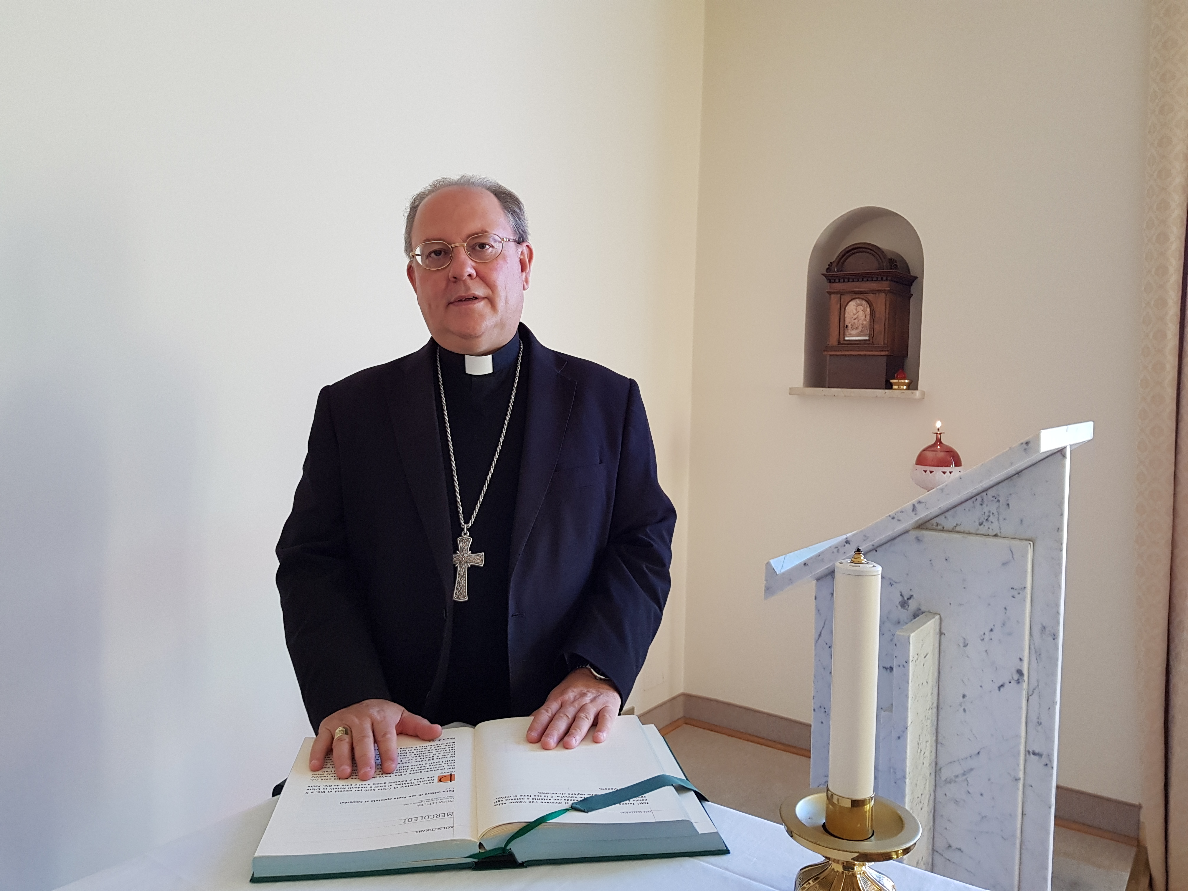 Mons. Fabio Fabene, vescovo titolare di Montefiascone, è il Sotto-Segretario del Sinodo dei Vescovi